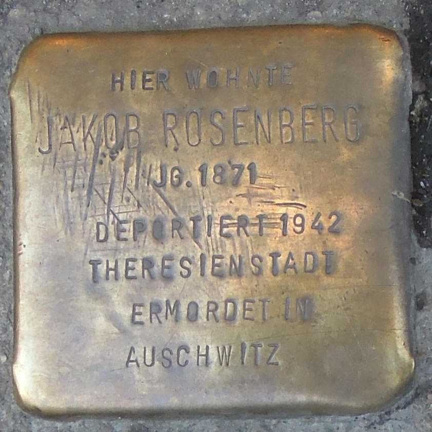 Stolperstein in Soest Brüderstraße 32, Jakob Rosenberg